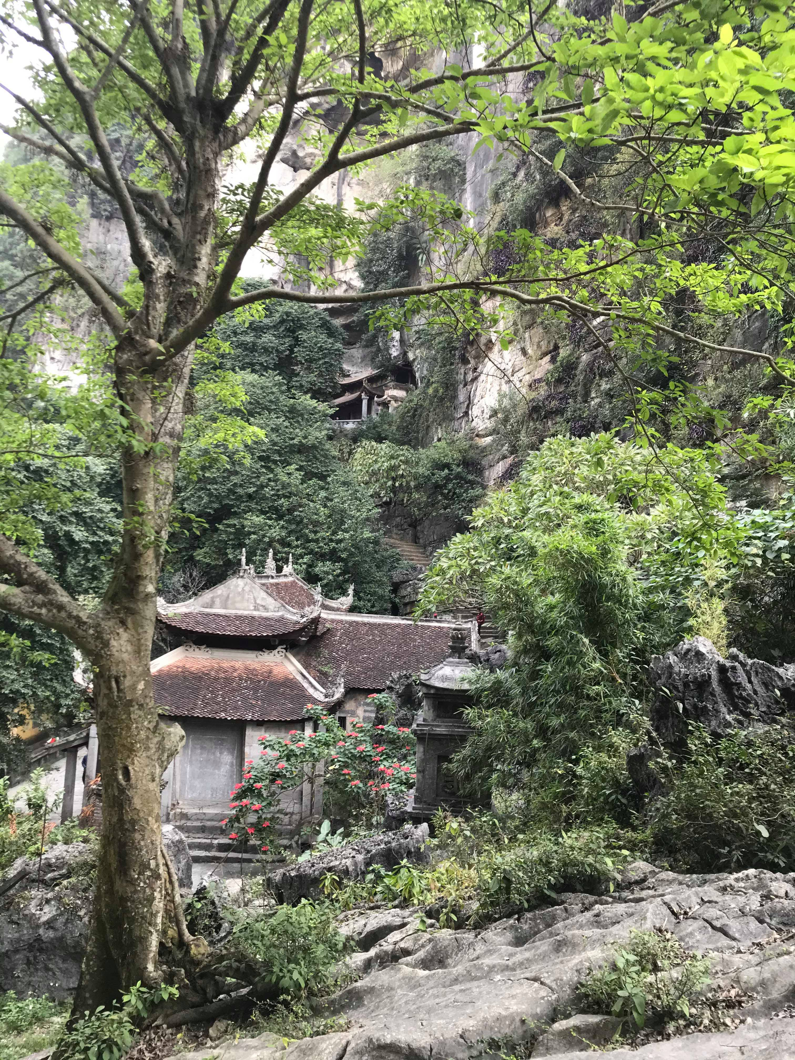 Chùa Hạ và chùa Trung nhìn từ đường đi vào động Thiên Cung